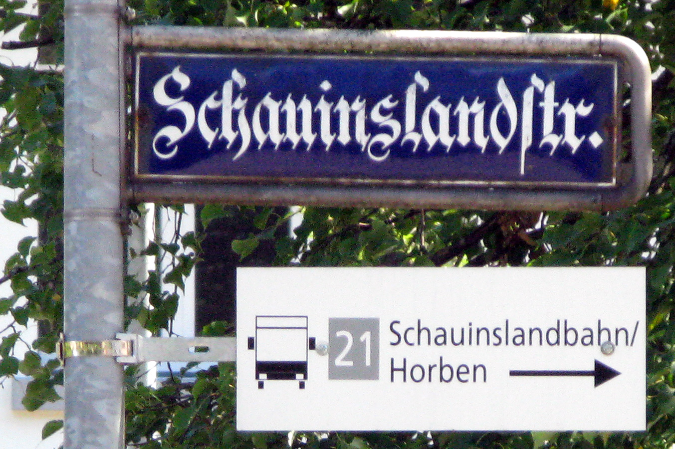 Schauinslandstraße, Schild in Freiburg-Günterstal bei der Haltestelle Dorfstraße